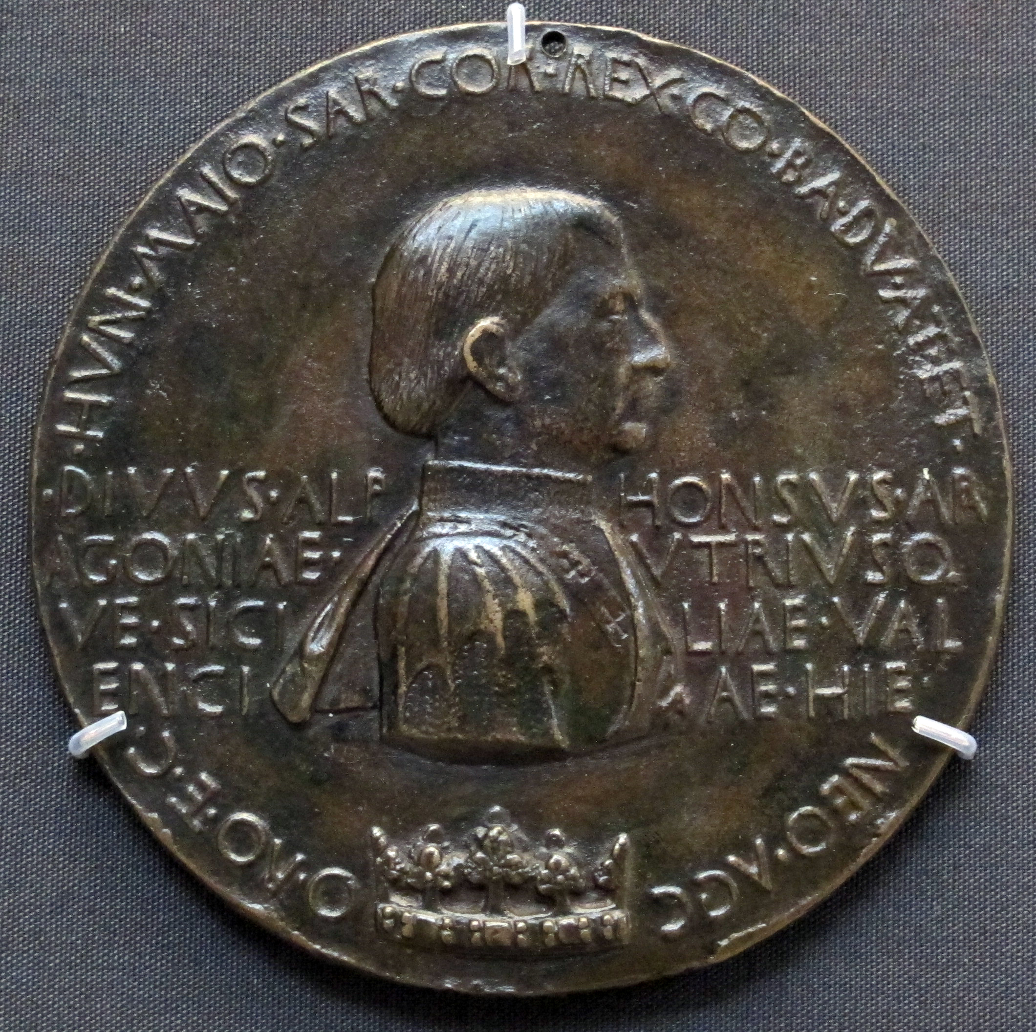 Pisanello, medaglia di alfonso V, 1448 ca.